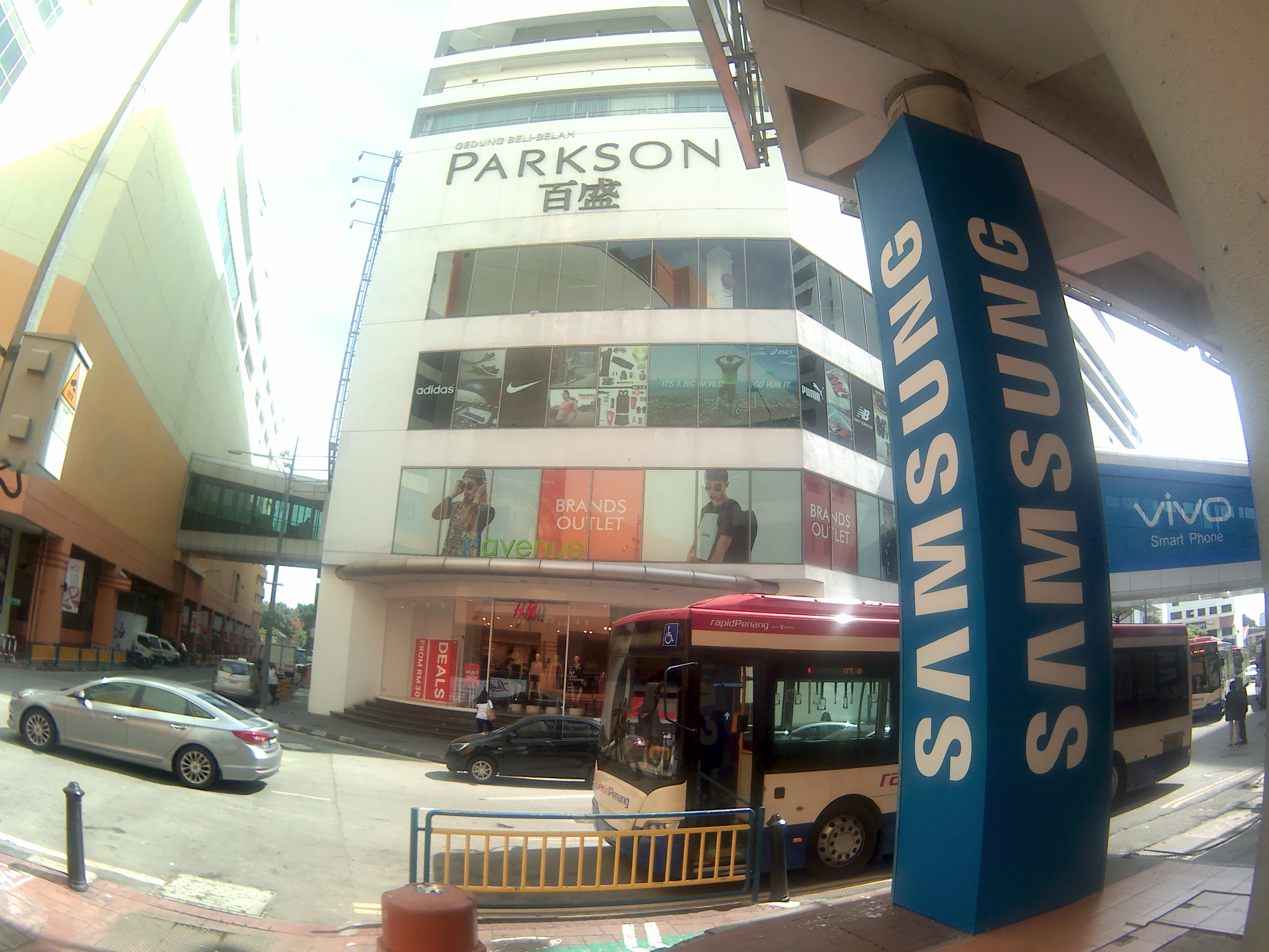 第一大道广场的百盛百货